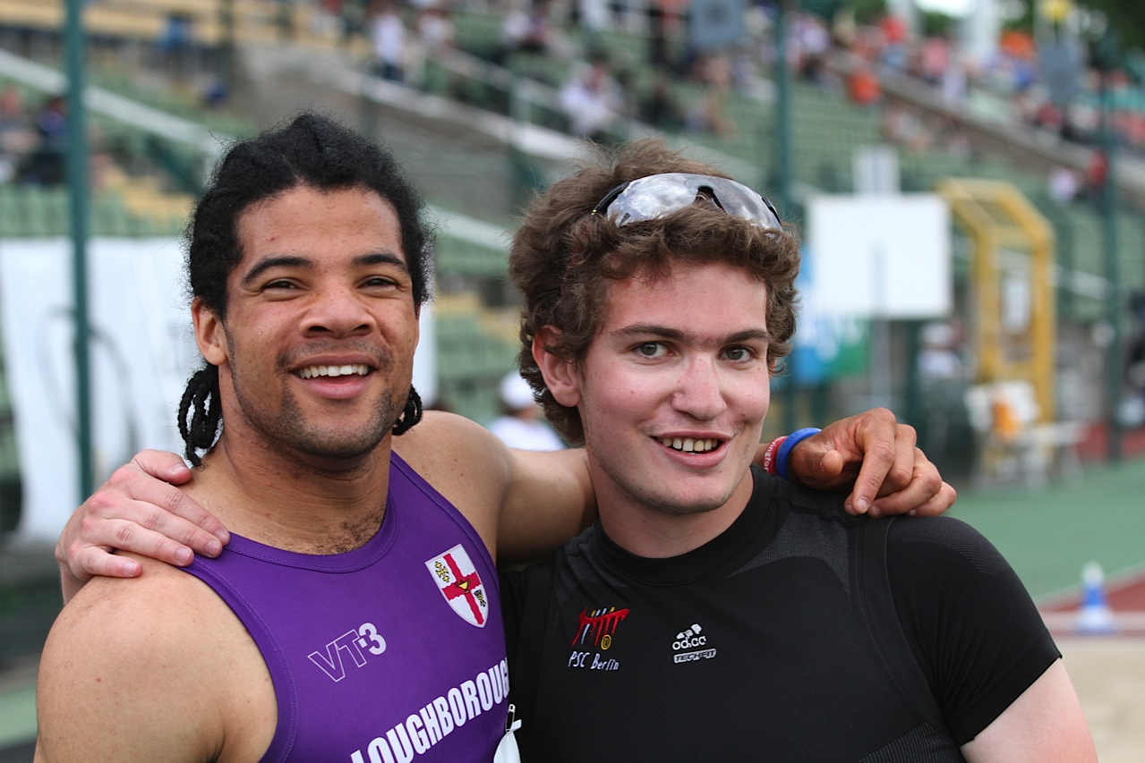 Sam Ruddock (GB, links) und Niels Stein (rechts), Berlin 2014